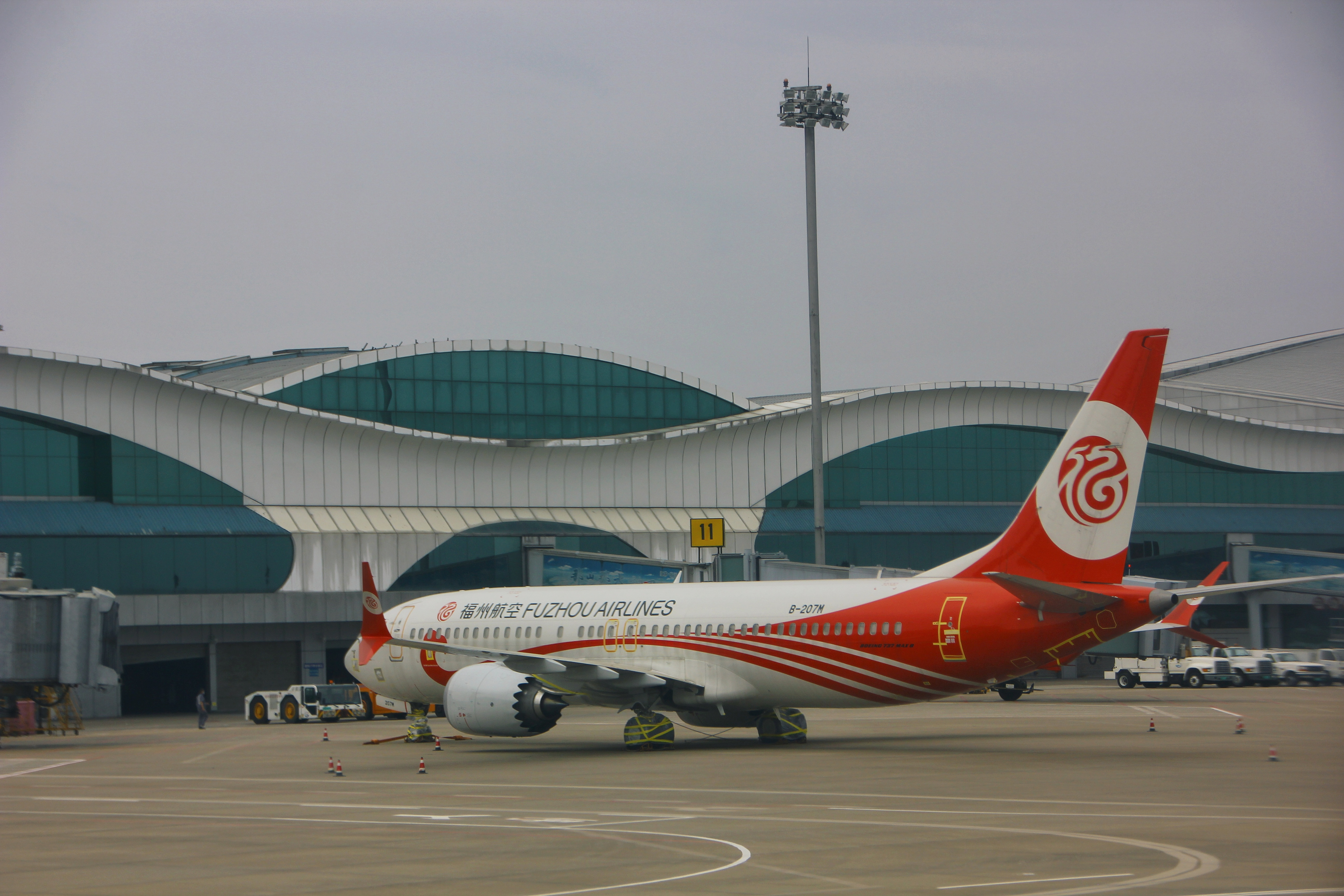 中文（中国大陆）: 福州航空的波音737max8在徐州观音机场